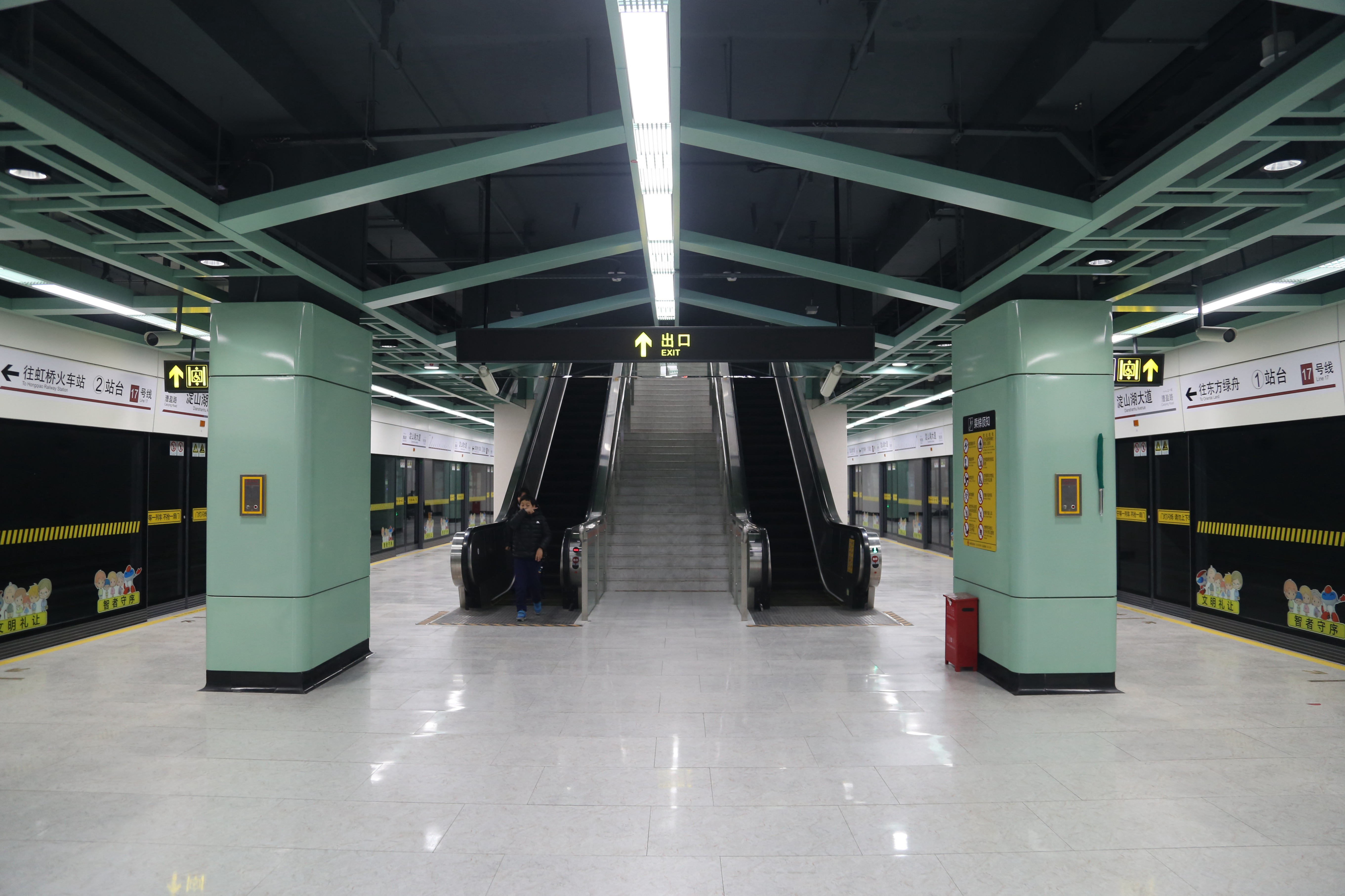 淀山湖大道站站台